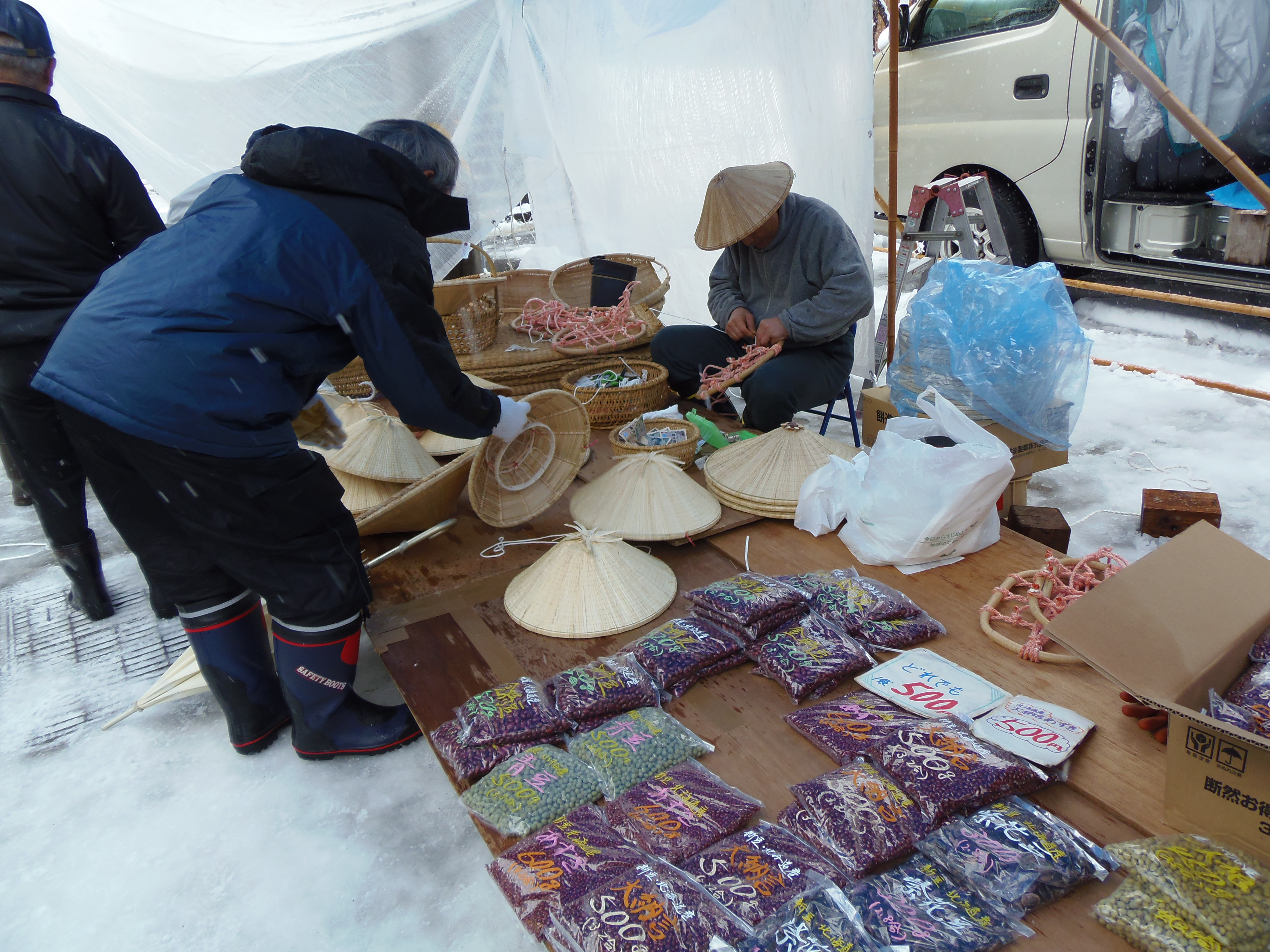 新潟県十日町市諏訪町通りの節季市。三度笠売りの様子。